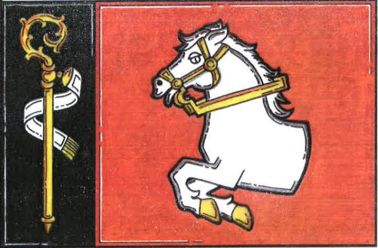 Bečice (CB), vlajka. List tvoří černý žerďový pruh široký čtvrtinu délky listu se žlutou berlou závitem k vlajícímu okraji a bílým sudariem, a červené pole s bílou polovinou koně se žlutými kopyty a uzděním. Poměr šířky k délce listu je 2 : 3.